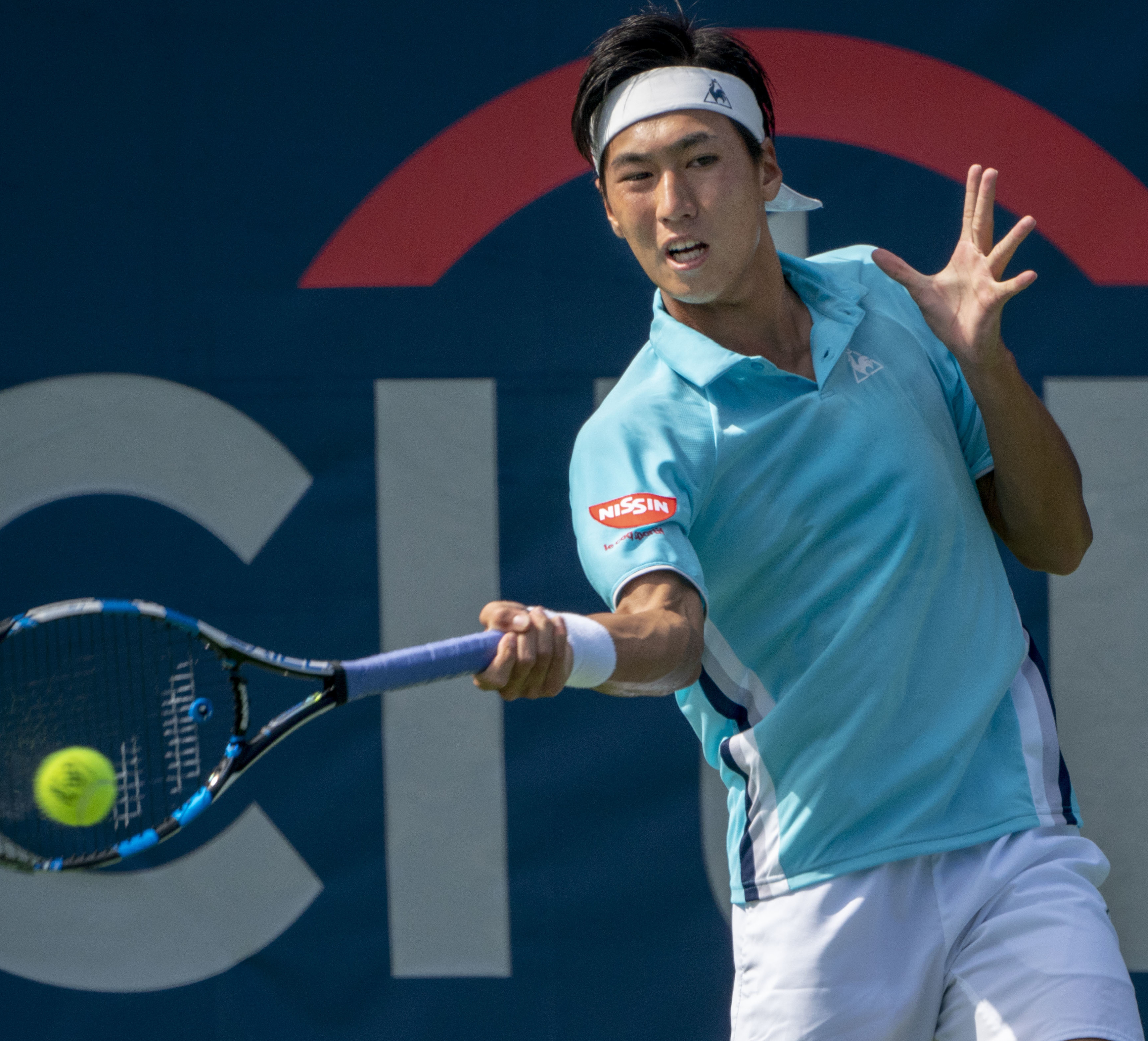 2018 Citi Open Tennis